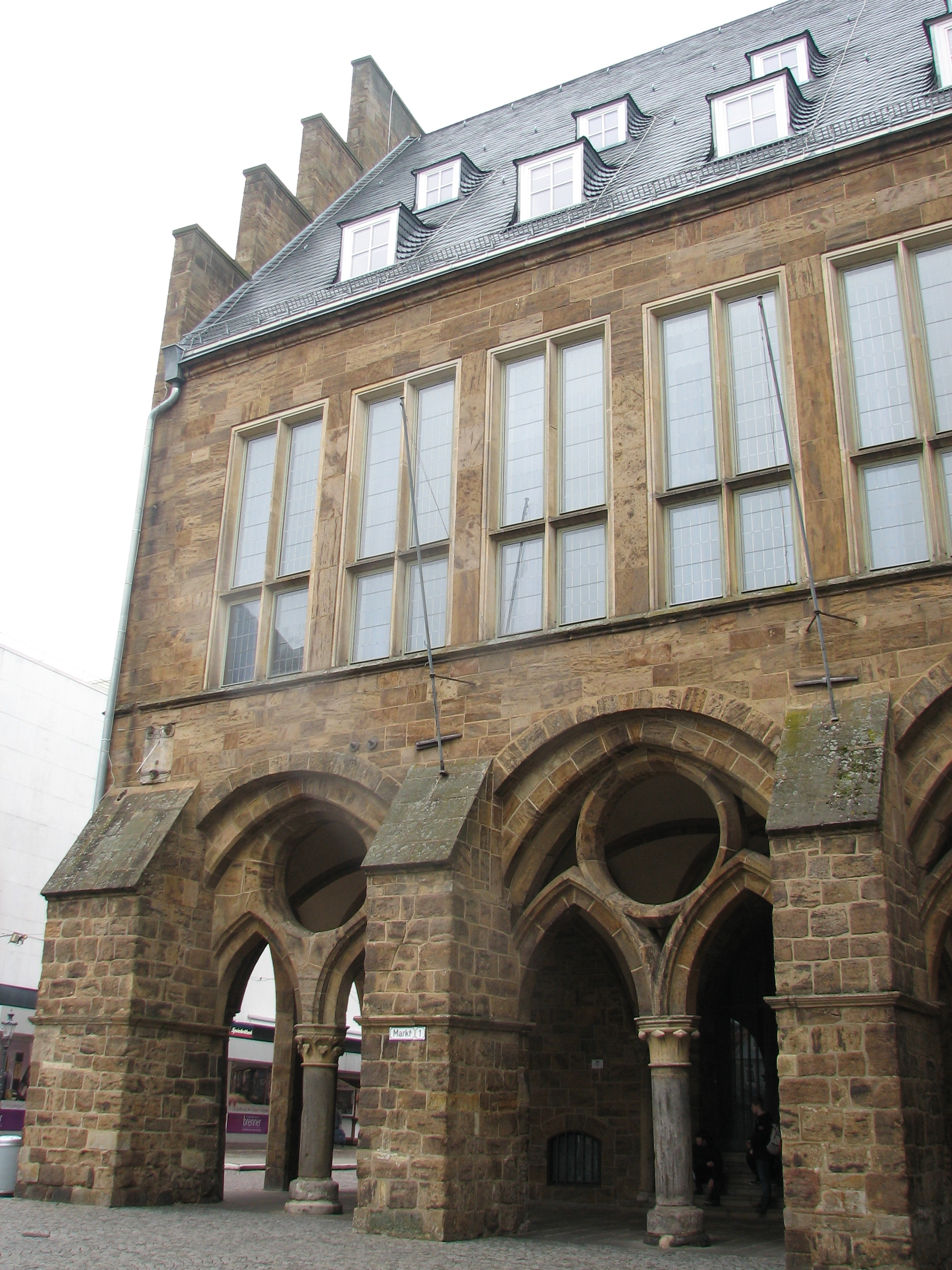 Denkmalgeschütztes Haus in der ostwestfälischen Stadt Minden / Westf.This is a photograph of an architectural monument., no. 88